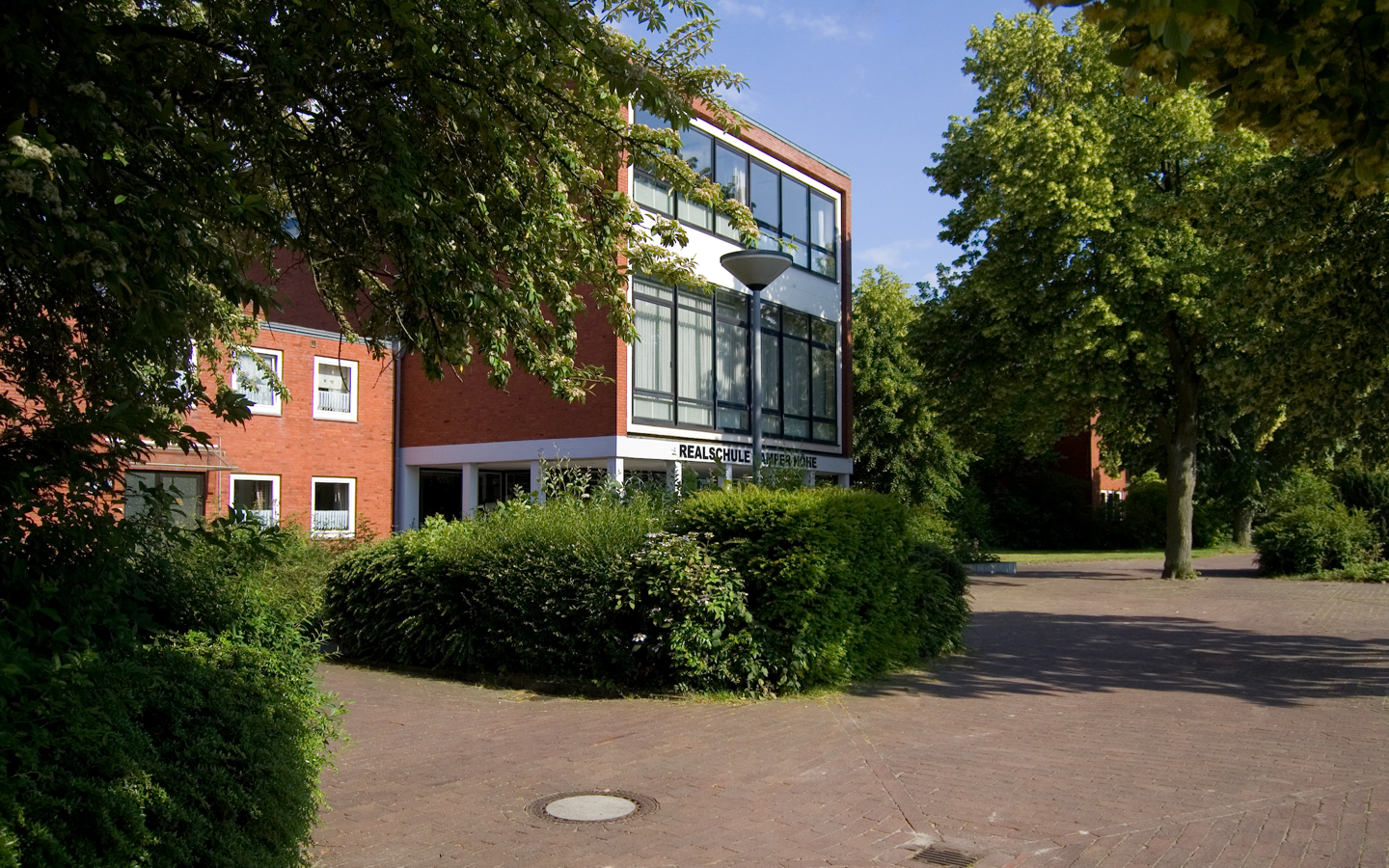 Dies ist eine Fotoaufnahme der Realschule Camper Höhe an einem späten Nachmittag, aufgenommen am 22. Juni 2009.